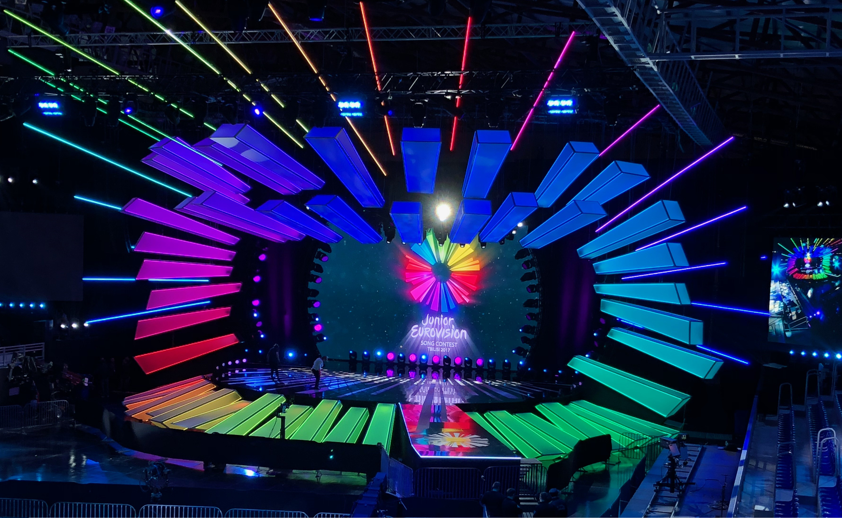 Scena 15. Konkursu Piosenki Eurowizji dla Dzieci 2017.